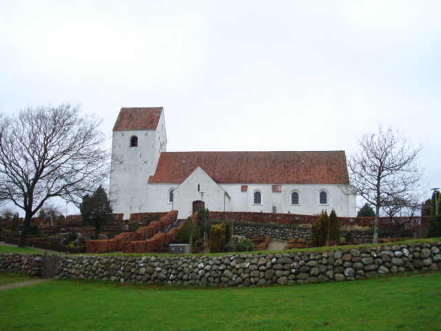 Fruering Kirke / Fruering Church, Jutland, Denmark